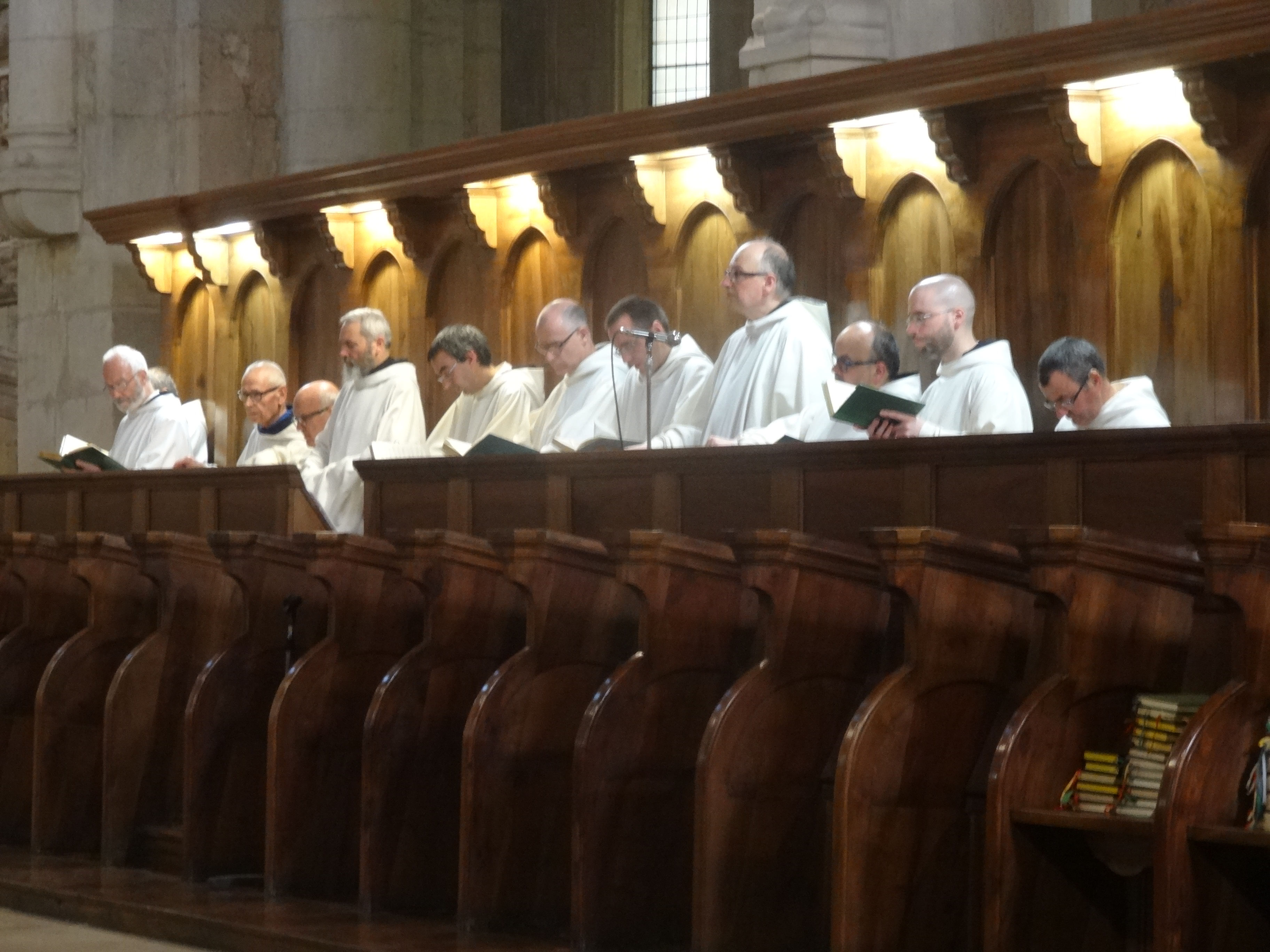 Monestir de Poblet.